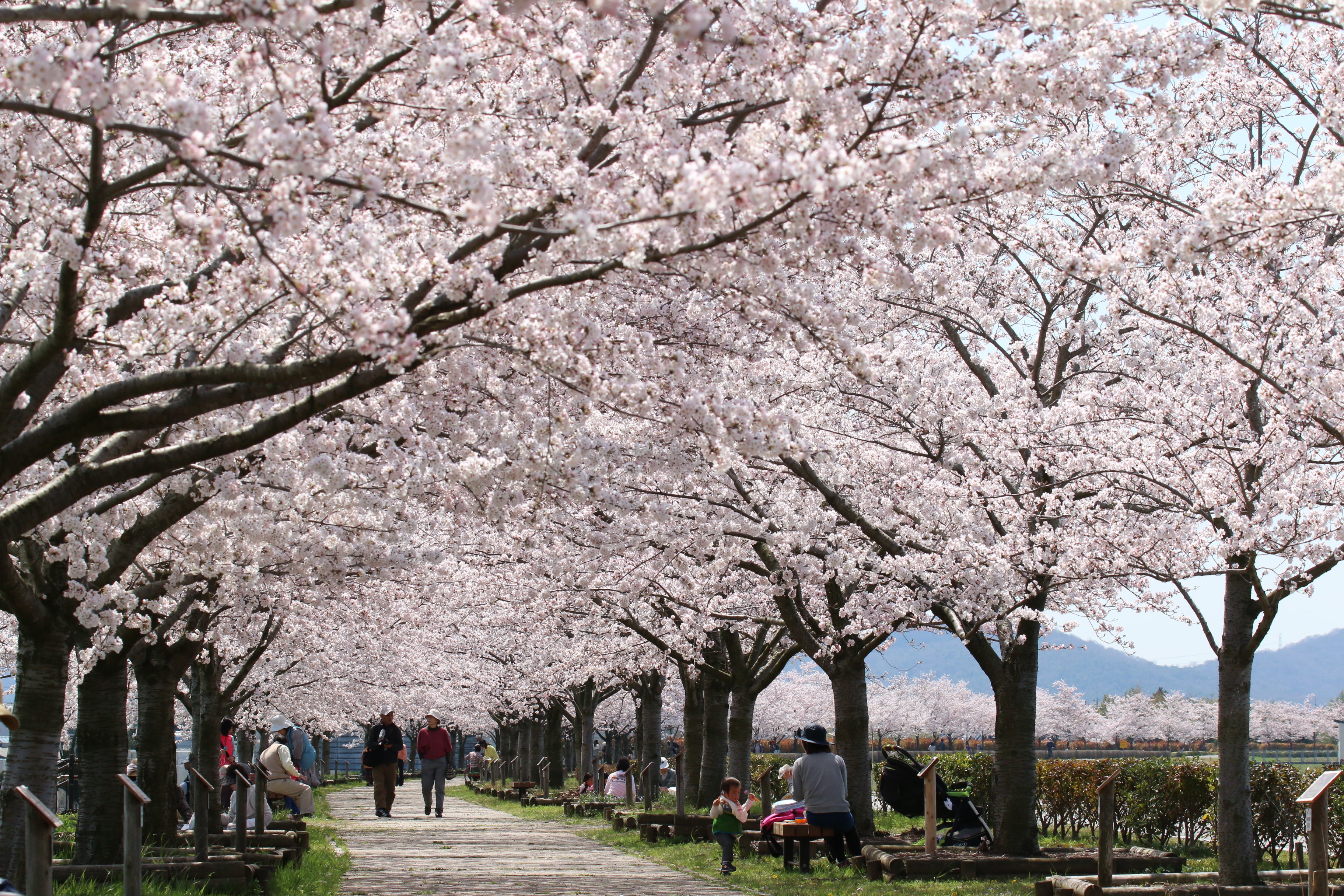 おの桜づつみ回廊 4kmにわたる散策道に5種類の桜並木650本